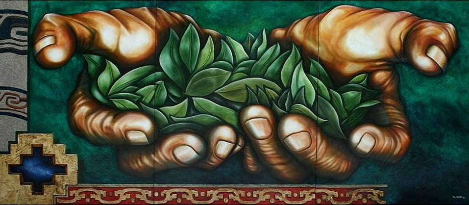 El pojchaso, de los Andes para la humanidad. Tríptico. Oleo sobre lienzo y esgrafiado. 2006.